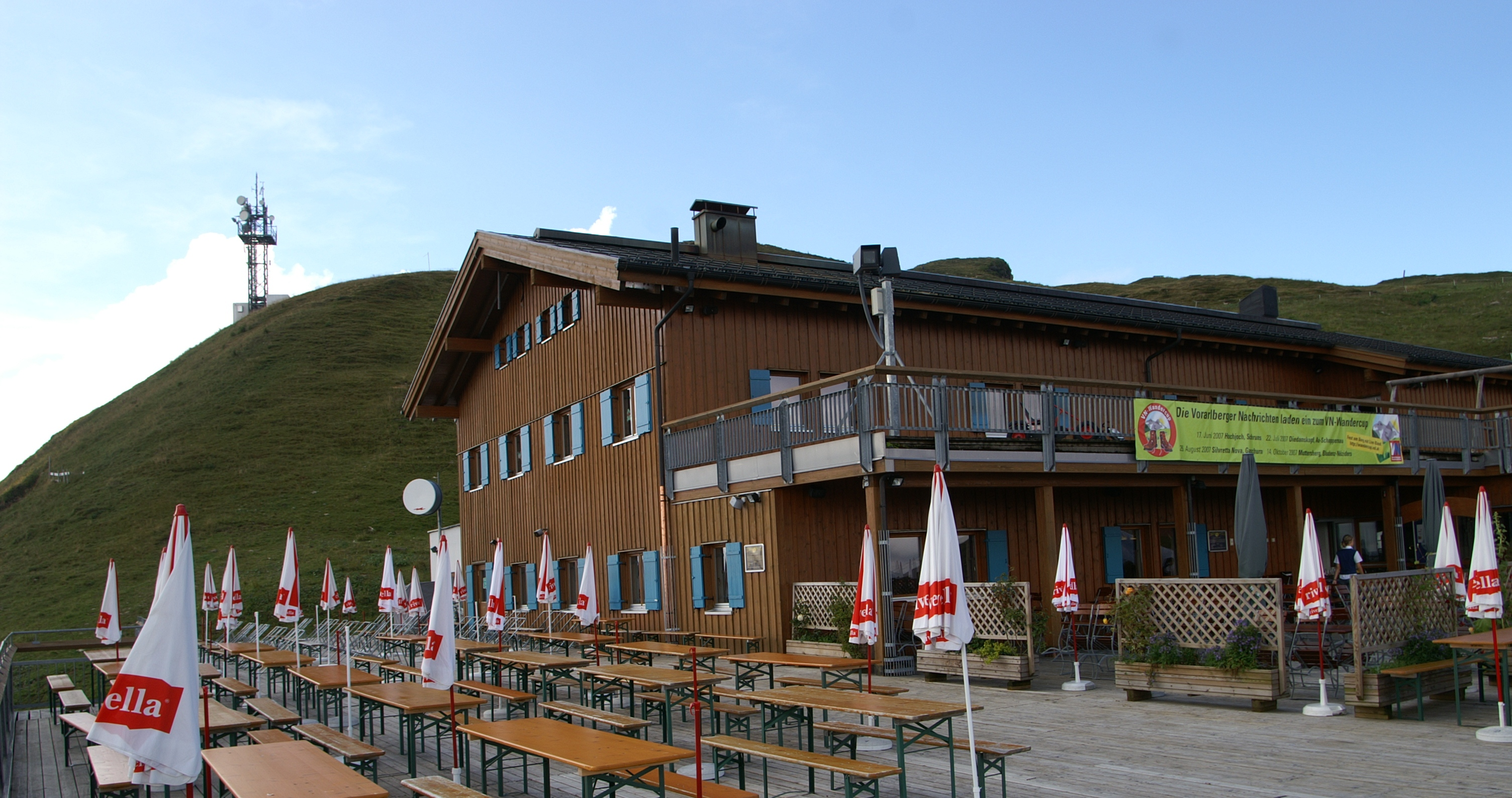 Bergstation und Restaurant der Bergbahnen Diedamskopf in Schoppernau im Bregenzerwald , Vorarlberg